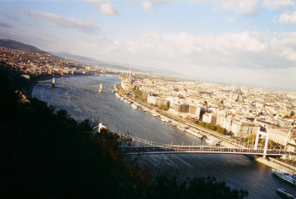 View over Budapest